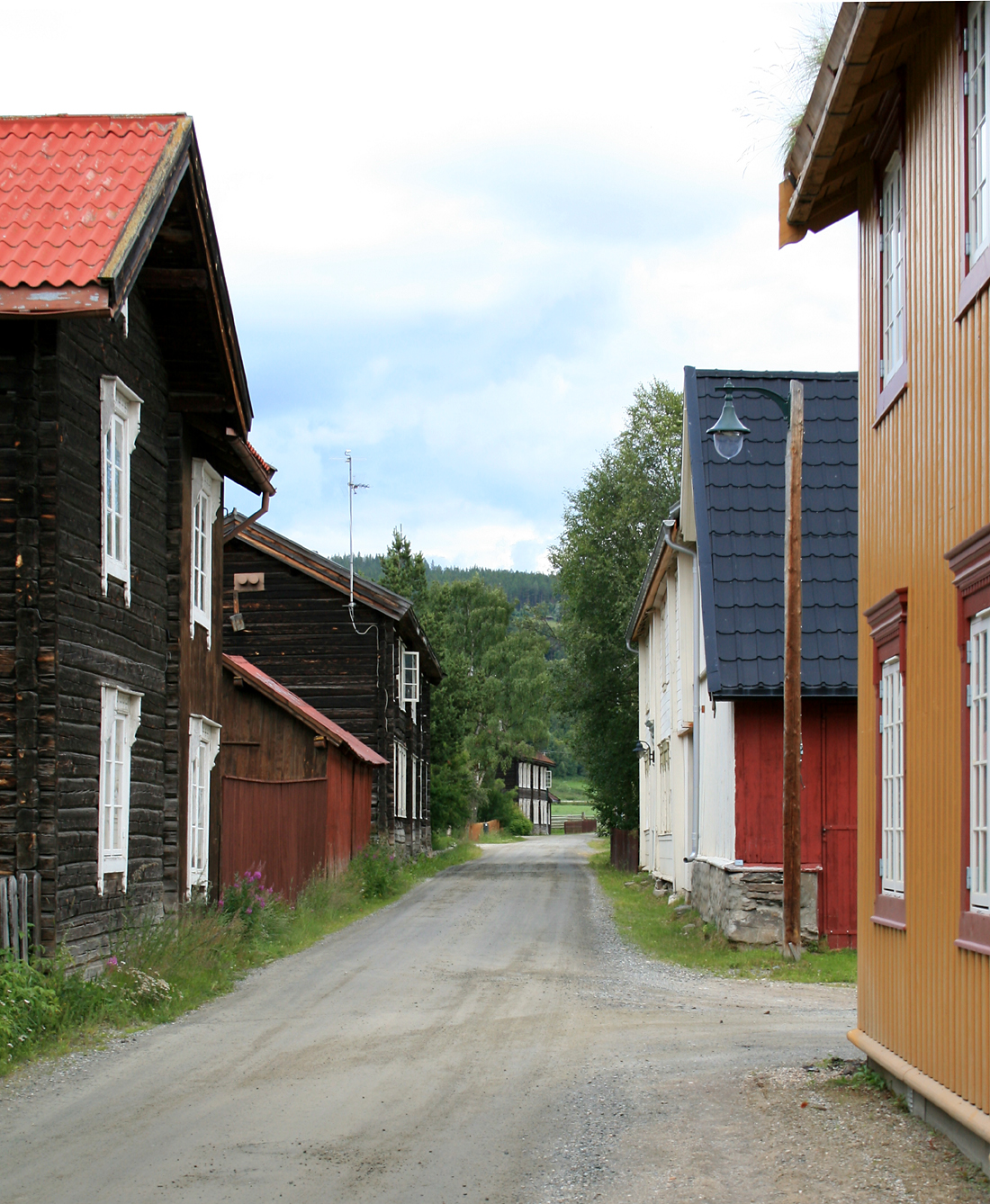 Gata, Tolga, Norway.